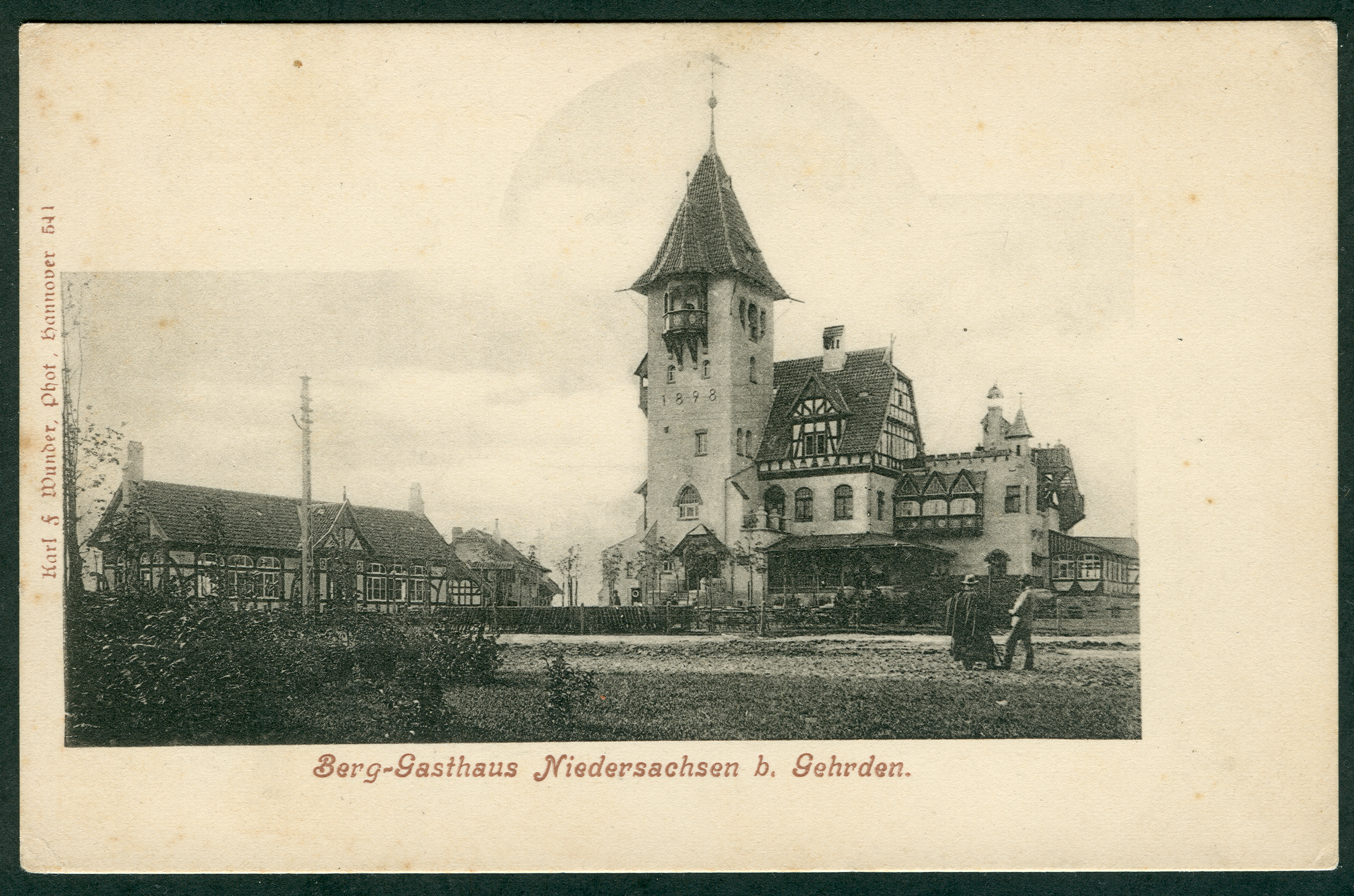 Ansichtskarte Nummer 541 mit dem Berggasthaus Niedersachsen bei Gehrden. Deutlich ist an dem ehemaligen Aussichtsturm auf dem Gehrdener Berg das Baujahr 1898 zu erkennen.